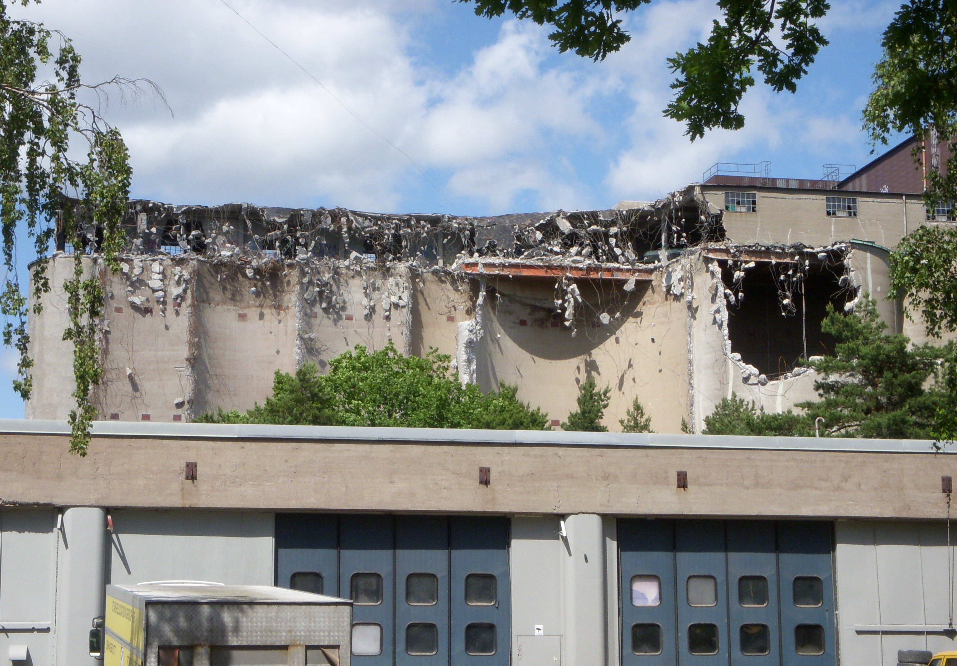 Kvarnholmens fabriksbyggnader under rivning (silobyggnaden)